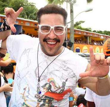 Carnaval bahia notÍCias 2012